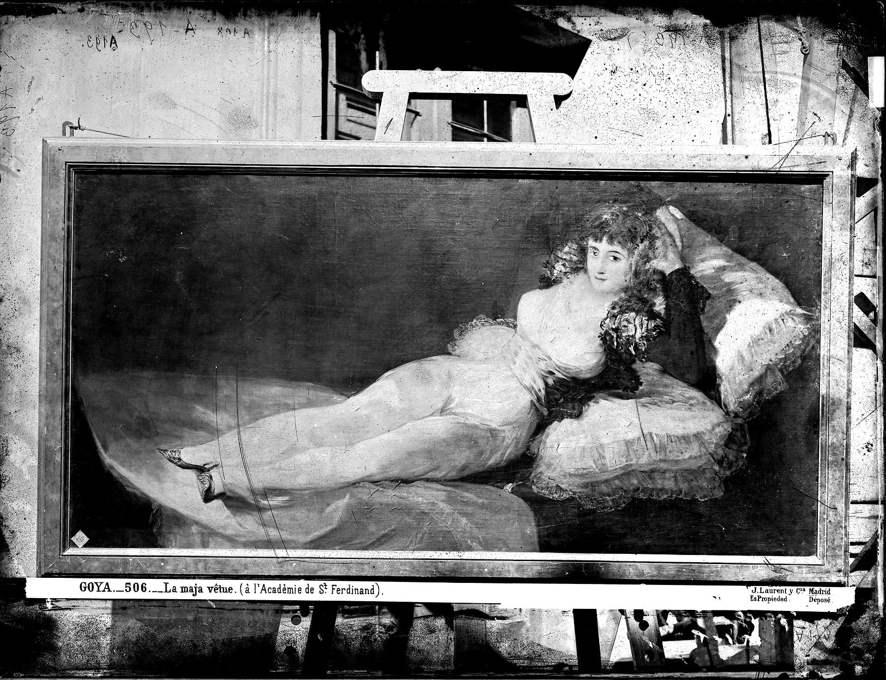 La famosa pintura "La maja vestida" de Francisco de Goya, fotografiada al sol, en la Real Academia de Bellas Artes de San Fernando, de Madrid, en el siglo XIX. El fotógrafo Laurent (Juan Laurent Minier, o Jean Laurent) tuvo que fotografiar esta pintura en el exterior, sobre un caballete, con iluminación directa solar. A partir de 1865 Laurent fotografió muchas pinturas originales en el exterior de los museos, pues en los interiores la luz natural era insuficiente. Entre los años 1865 y 1879, Juan Laurent fotografió toda clase de pinturas, con luz solar directa, especialmente en el exterior del Museo del Prado, y en un patio del Museo de la Trinidad (de la calle Atocha, de Madrid). En cambio, Laurent no pudo fotografiar con luz solar directa las famosas pinturas negras de la Quinta de Goya (o Quinta del Sordo), por ser unas pinturas murales. En ese caso, en 1874, Laurent debió utilizar iluminación eléctrica, pues ya contaba con un potente equipo portátil para dar luz eléctrica. Y sus fotografías de las 14 pinturas negras presentan una extraña iluminación, con un gran resplandor.